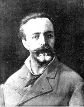 Autorretrato de Benet Mercadé, publicado en la revista española La Ilustración Artística.